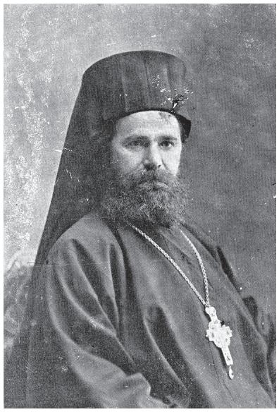 Методий Димов.